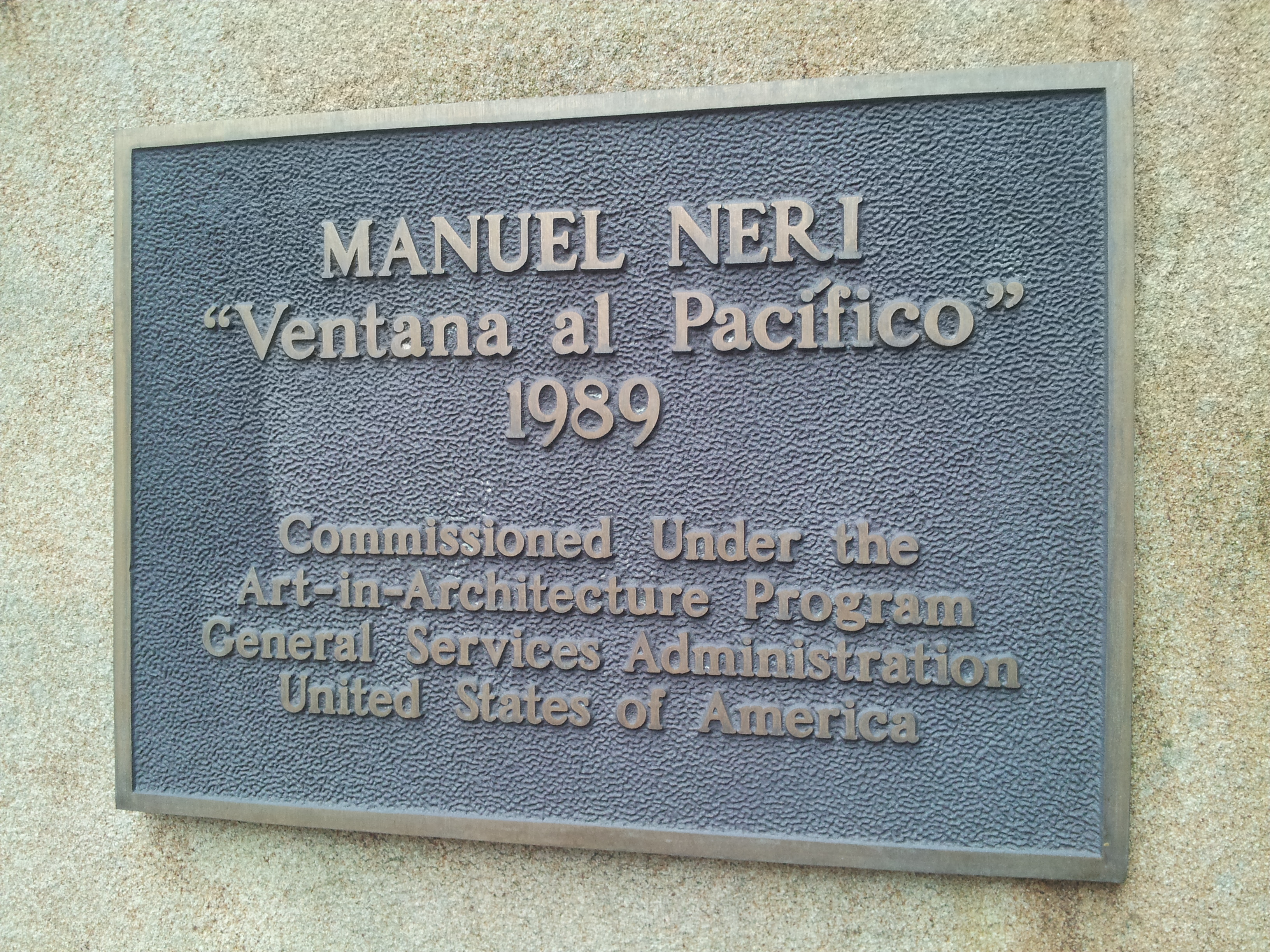 Ventana al Pacifico plaque, Portland, Oregon